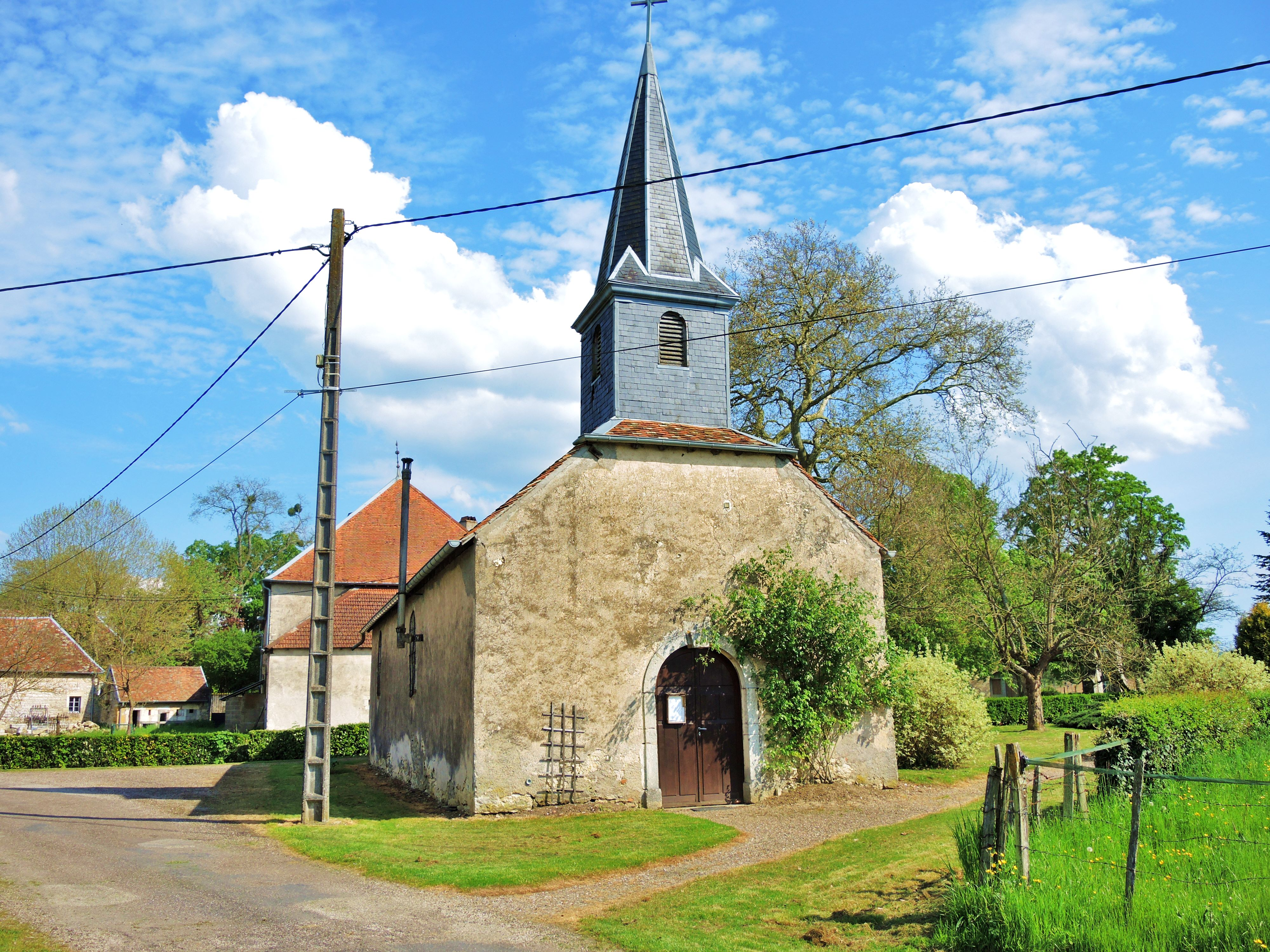 Chapelle saint joseph, édifiée en 1729.